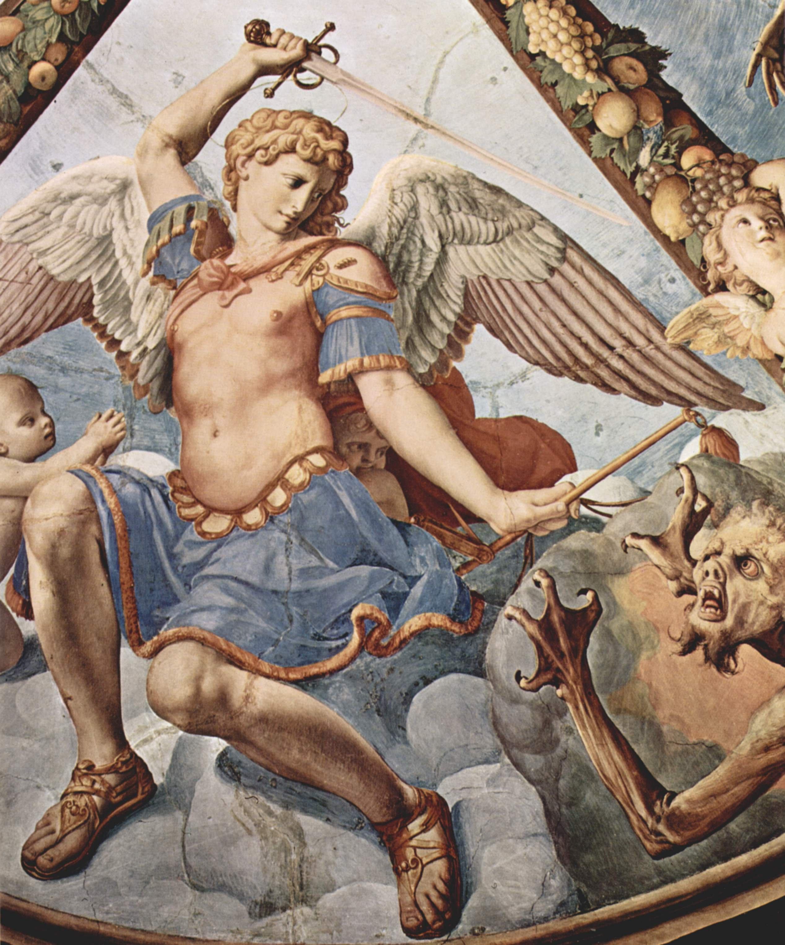 detail: Erzengel Michael